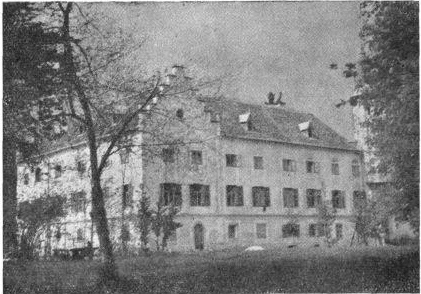 Dvorec Štrovsenek